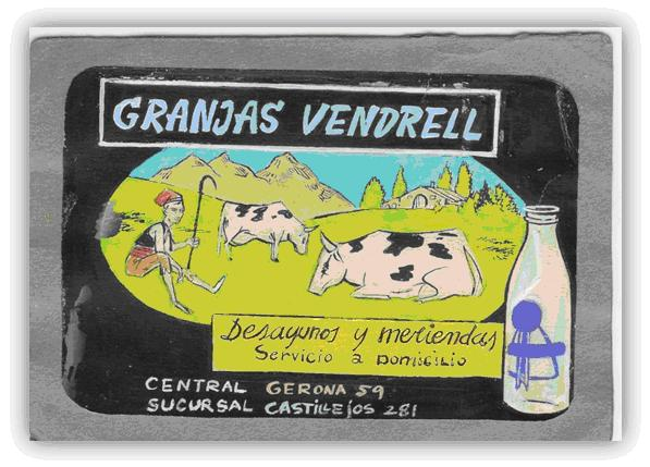 Publicitat de la Granja Vendrell